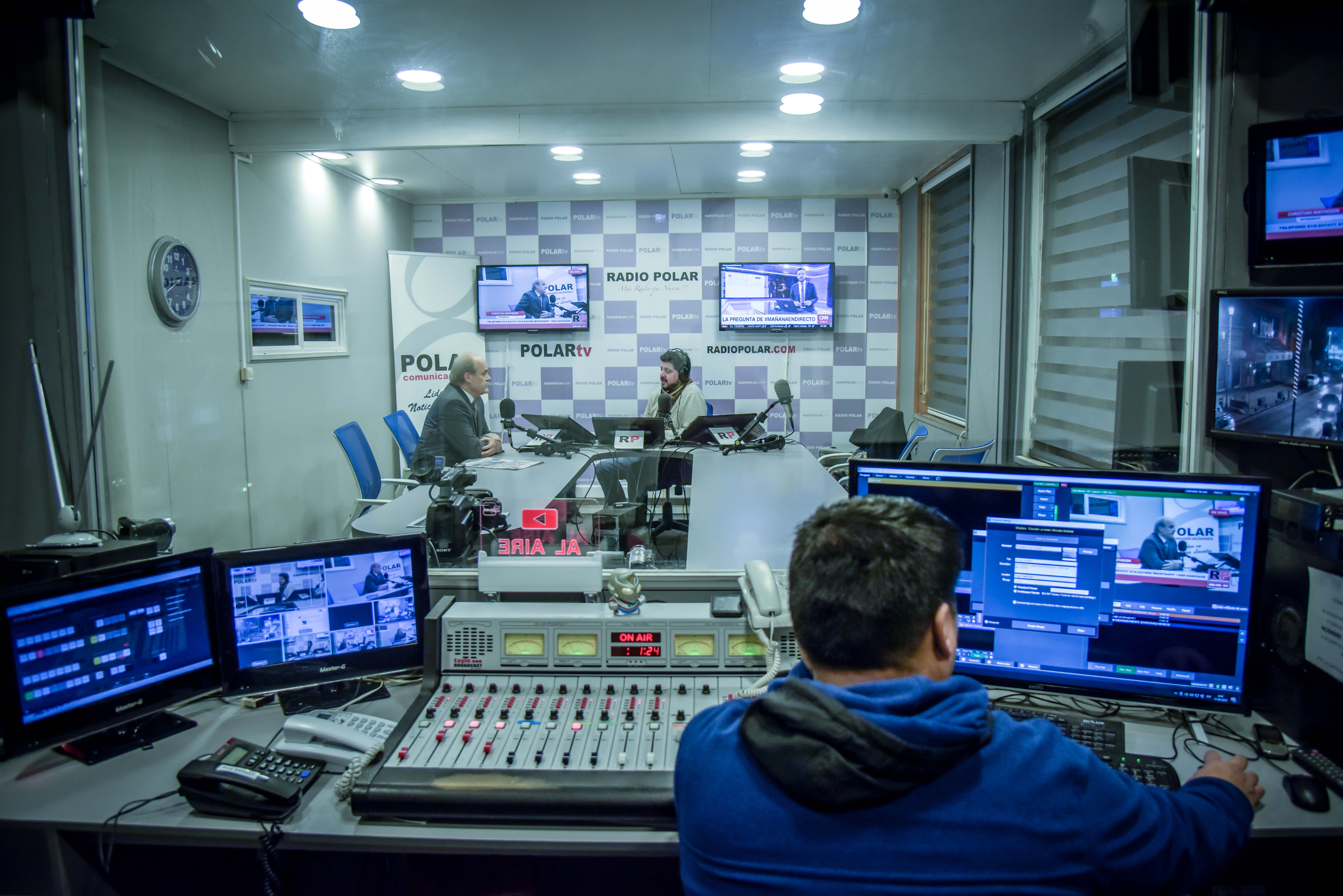 Entrevista Polar TV